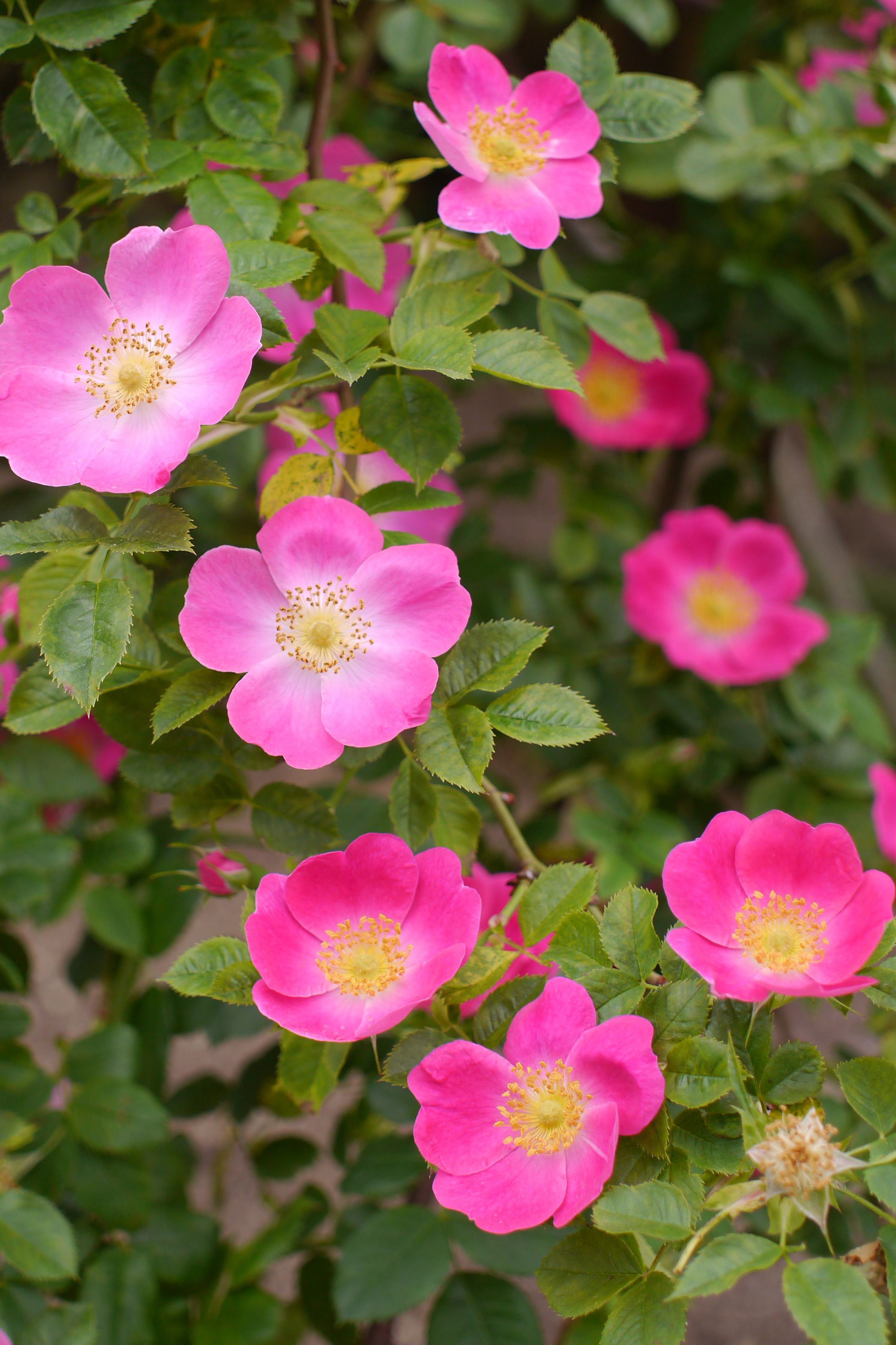 Rose, Kiese, バラ, キーゼ, Old rose(HCan) オールドローズ Germany ドイツ Kiese 1910